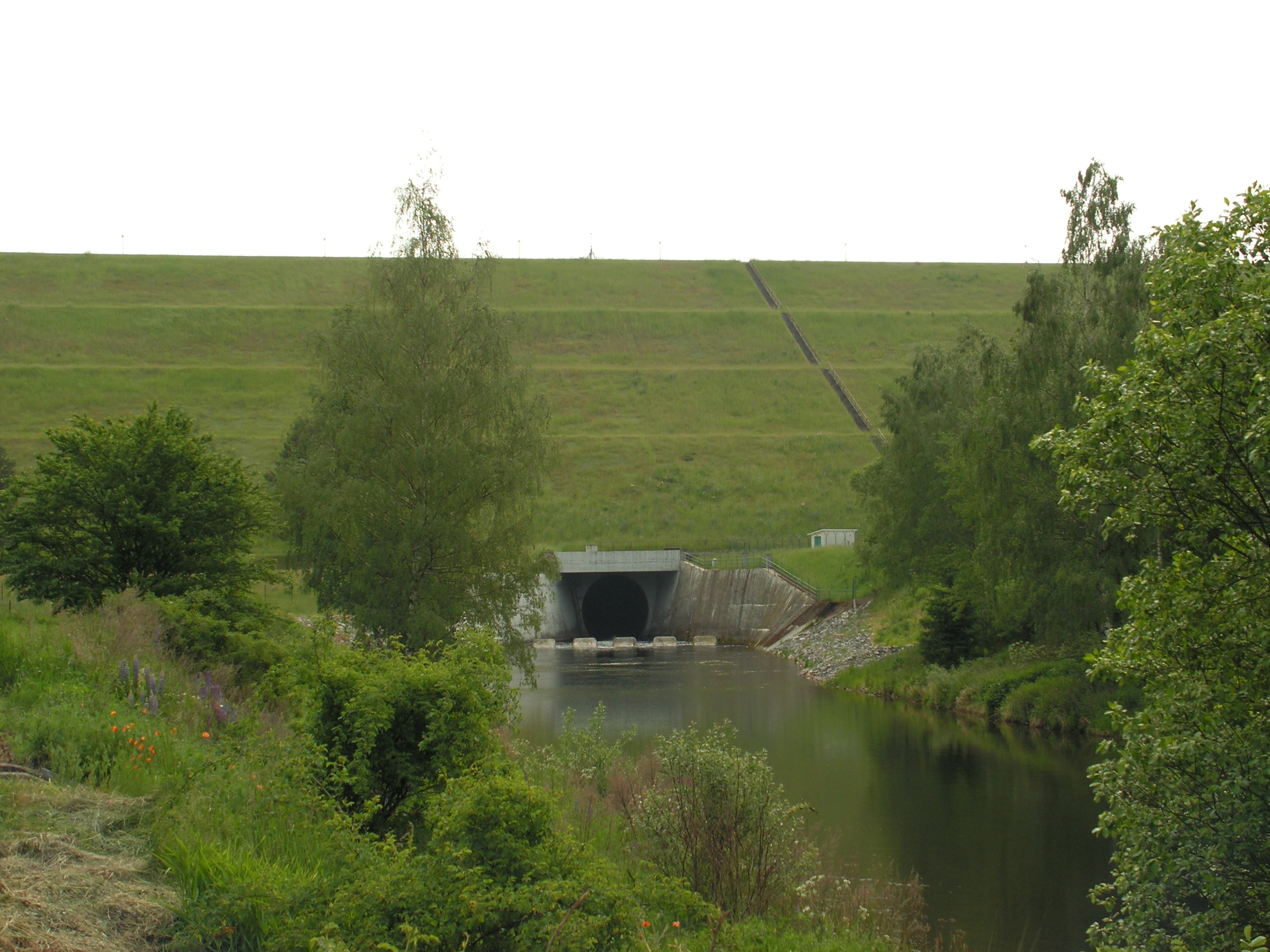 Pohled na hráz VD Želivka - Švihov.